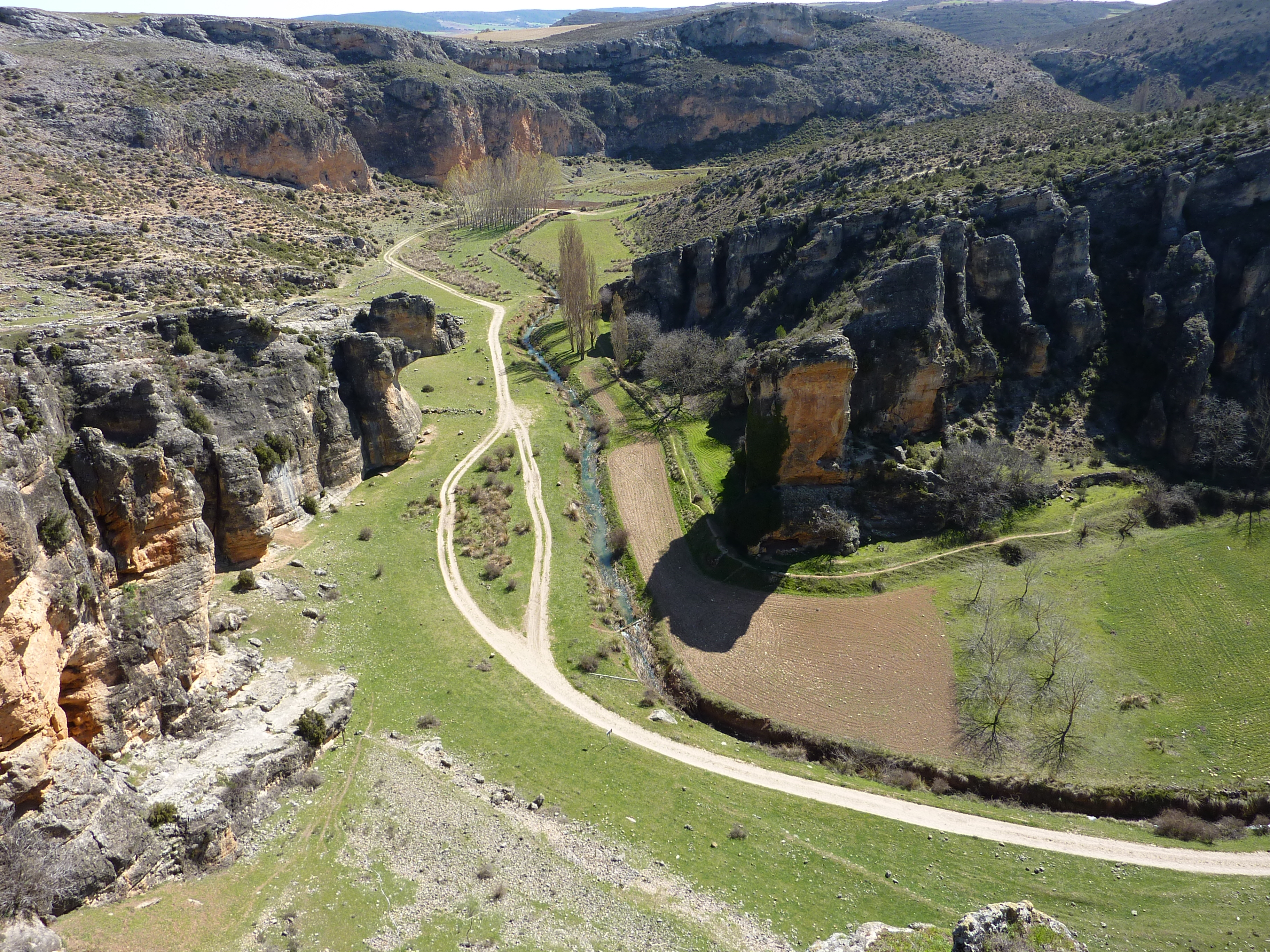 Hoz del río Gritos y páramos de Las Valeras This is a photography of a Special Area of Conservation in Spain with the ID: ES0000160. Natura2000 entry, EEA entry